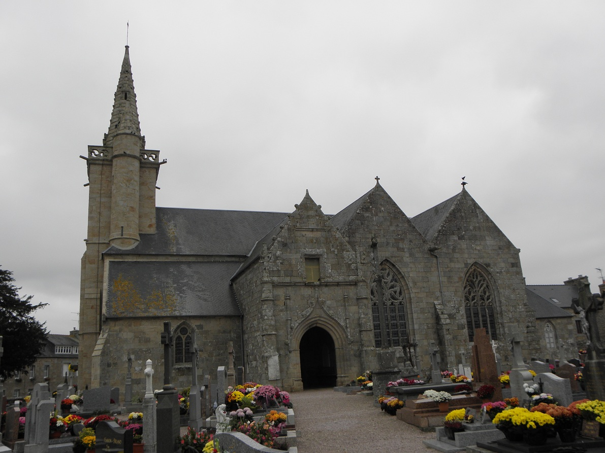 Flanc méridional de l'église Saint-Pierre à Pluzunet (22).